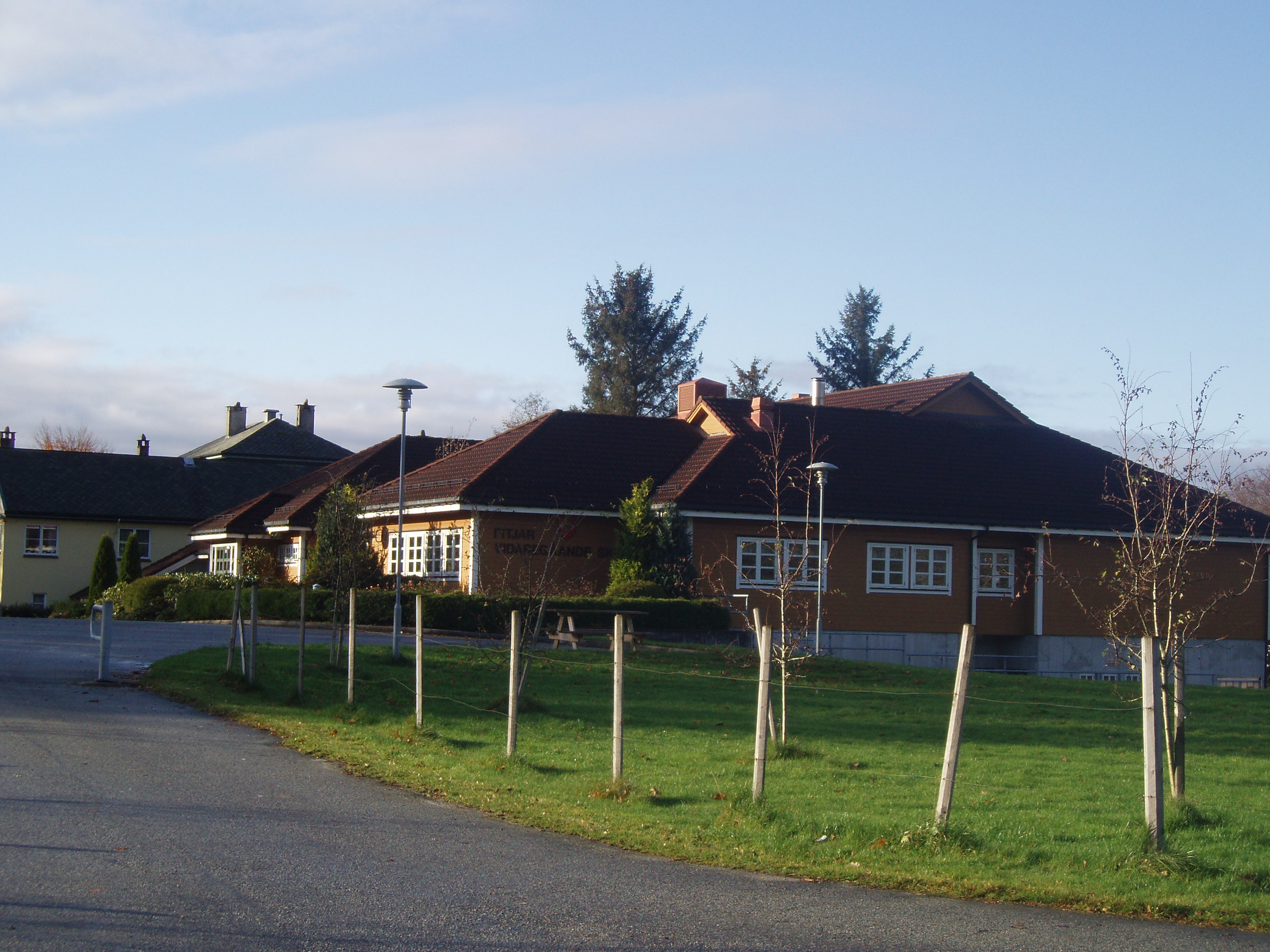 Fitjar vidaregåande skule